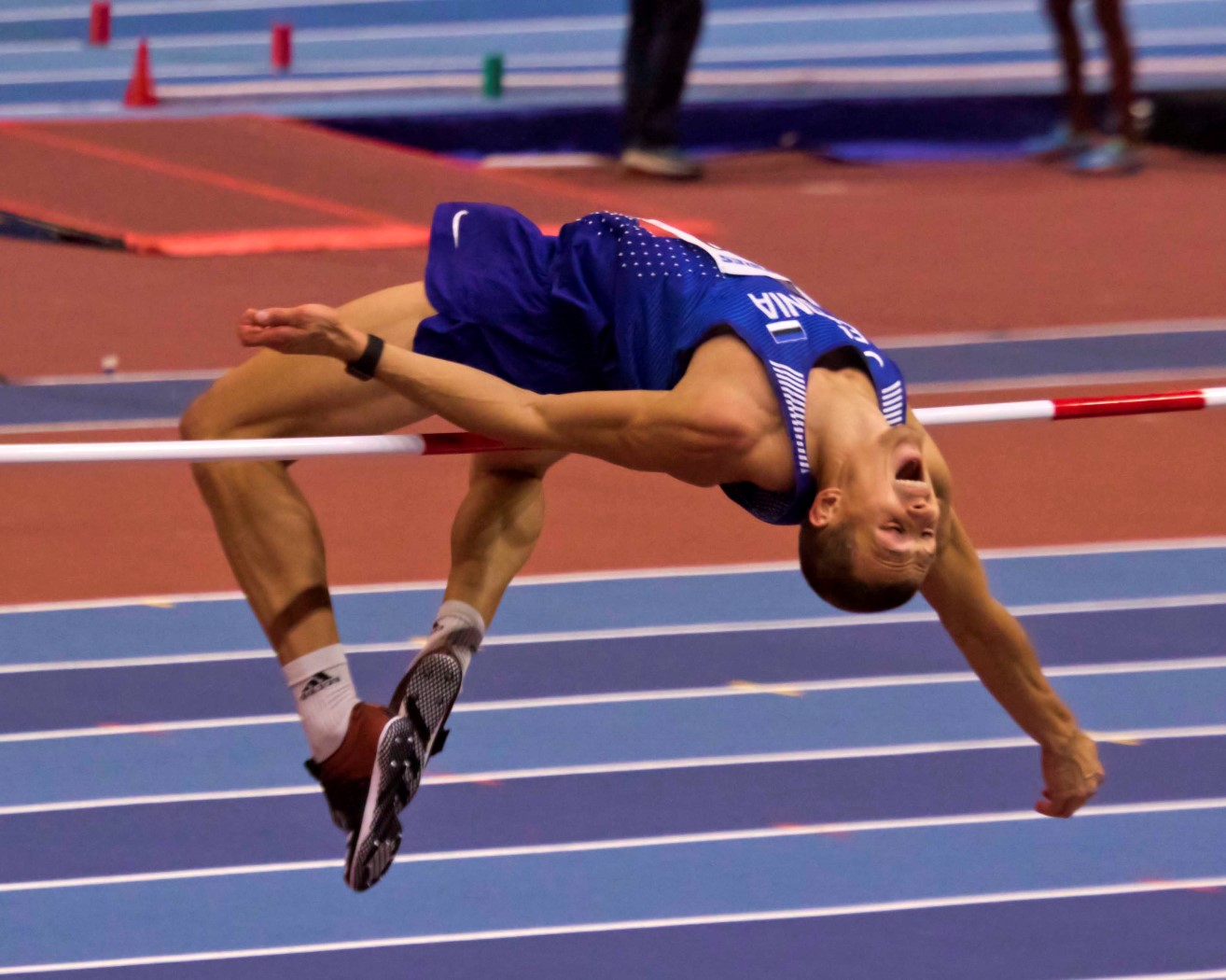 WK2B0148 uibo hoog